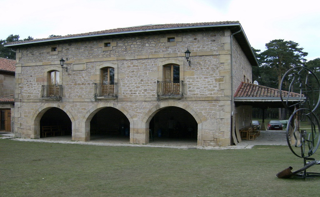 Municipio de Canicosa de la Sierra, en Burgos (España)